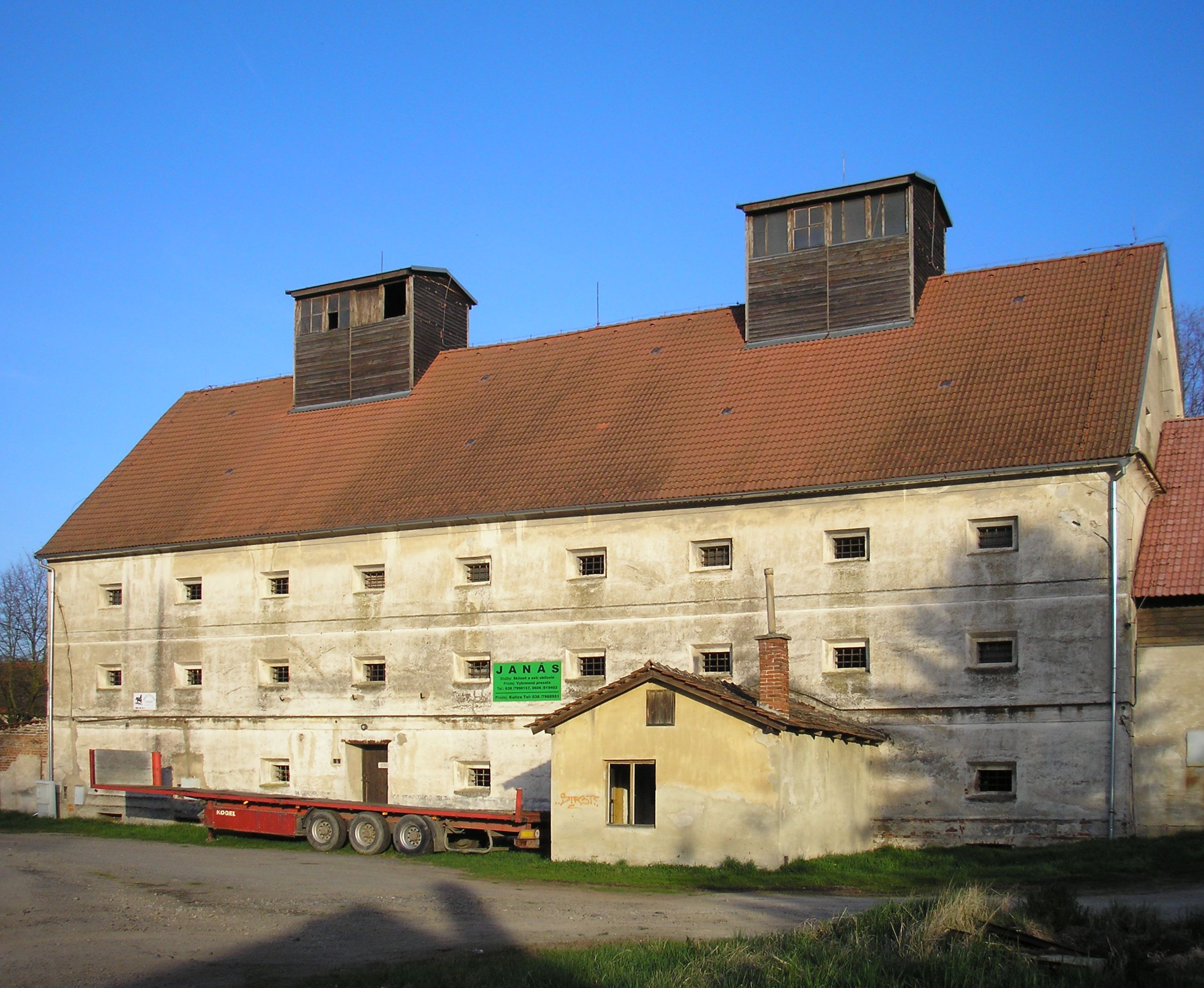 Špýchar v Plavnici, poblíž je větší koncentrace památných stromů